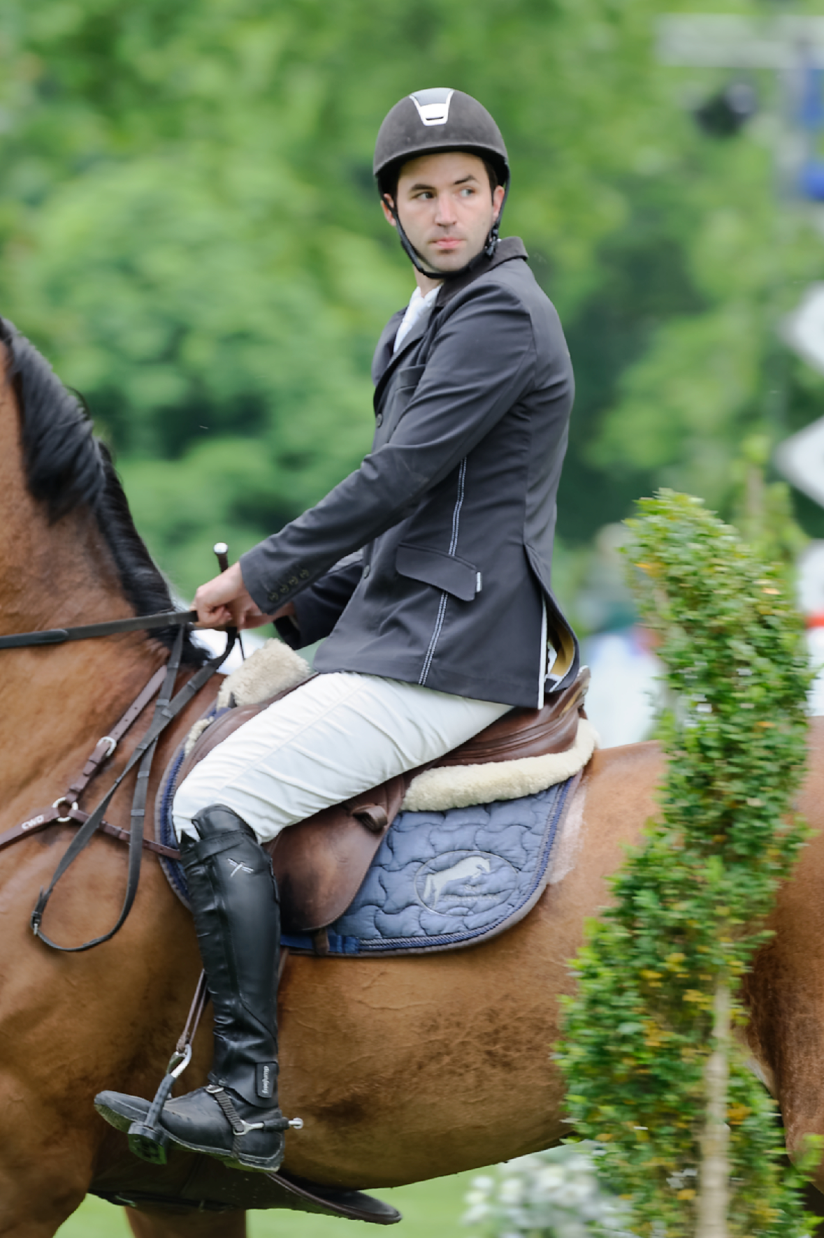 Wiesbaden Pferdenacht Christian Glienewinkel auf Professional Aircare